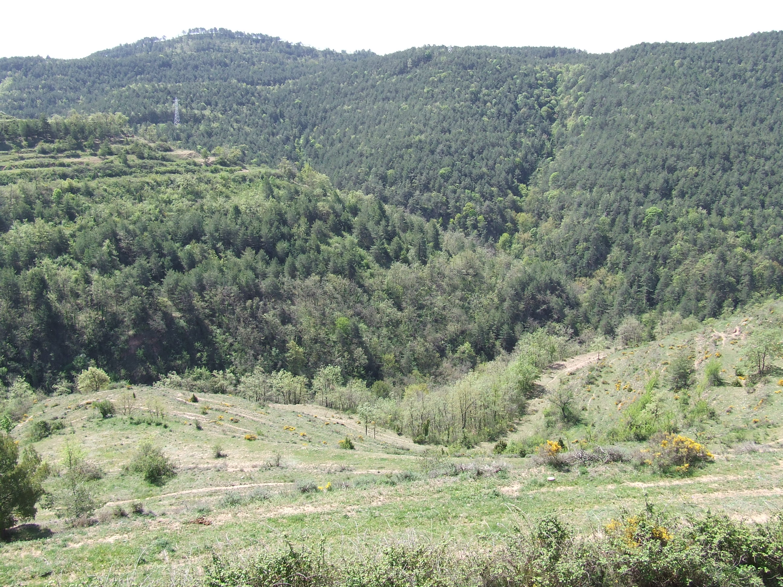 El Riu Sec, capçalera (l'Estany, Moianès)